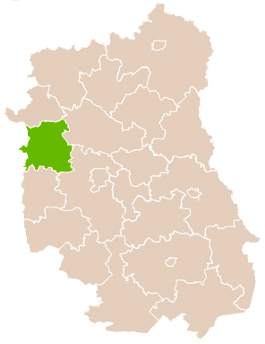 Map of Puławy county, Lublin voivodship Mapa powiatu puławskiego, województwo lubelskie